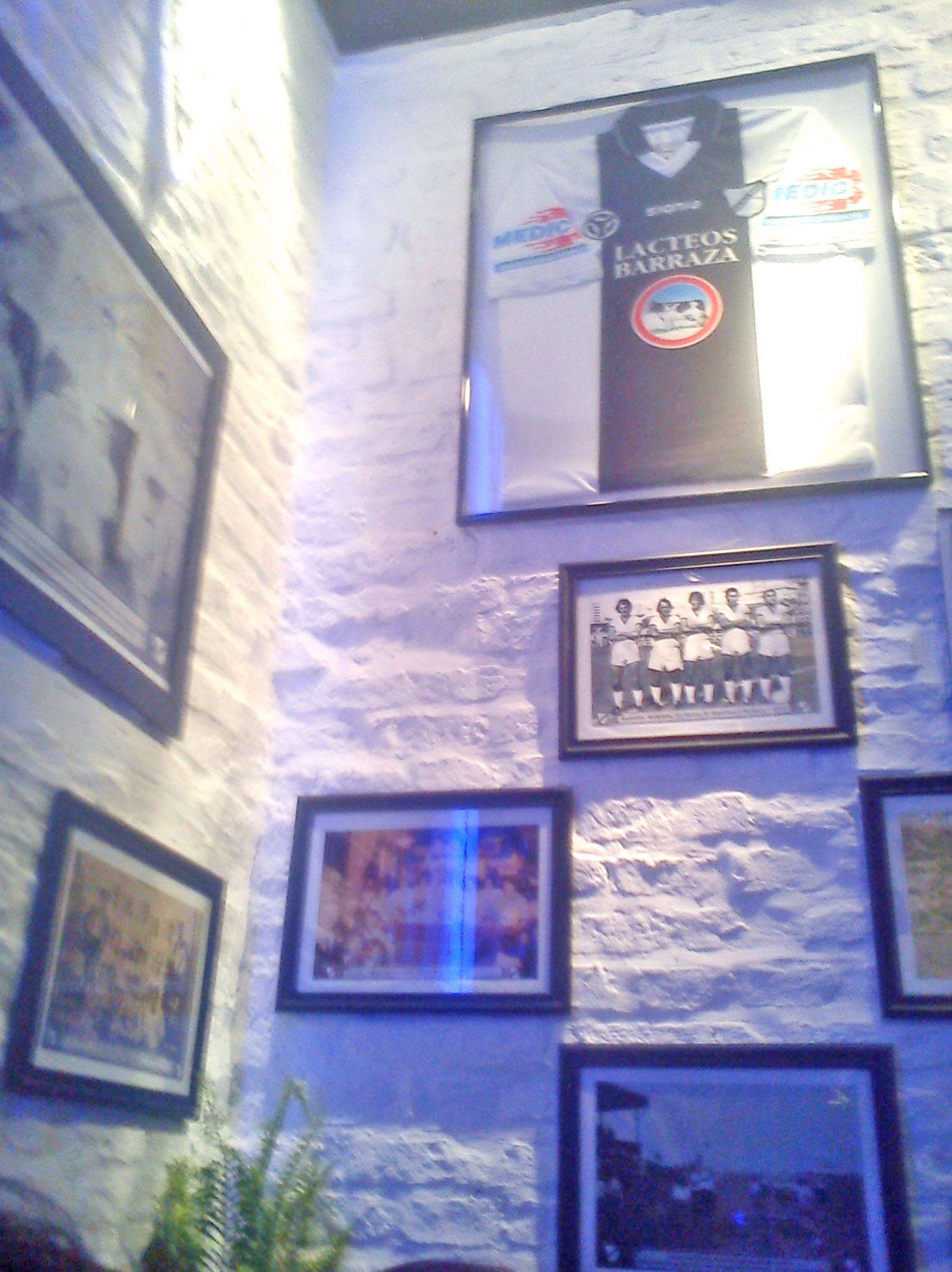 Retratos varios dentro del Restaurante Parrilla All Boys